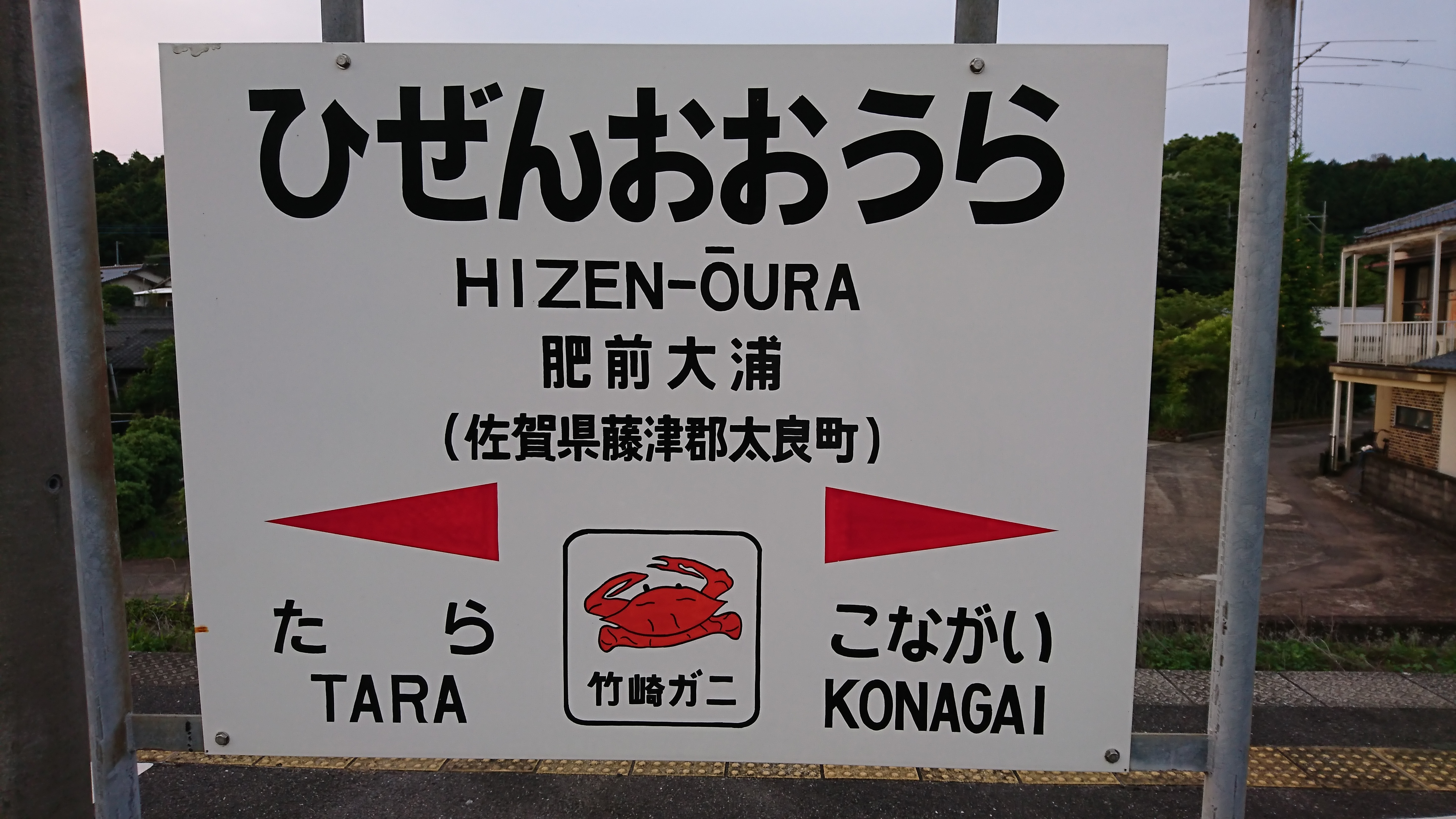 肥前大浦駅 2017.6.13